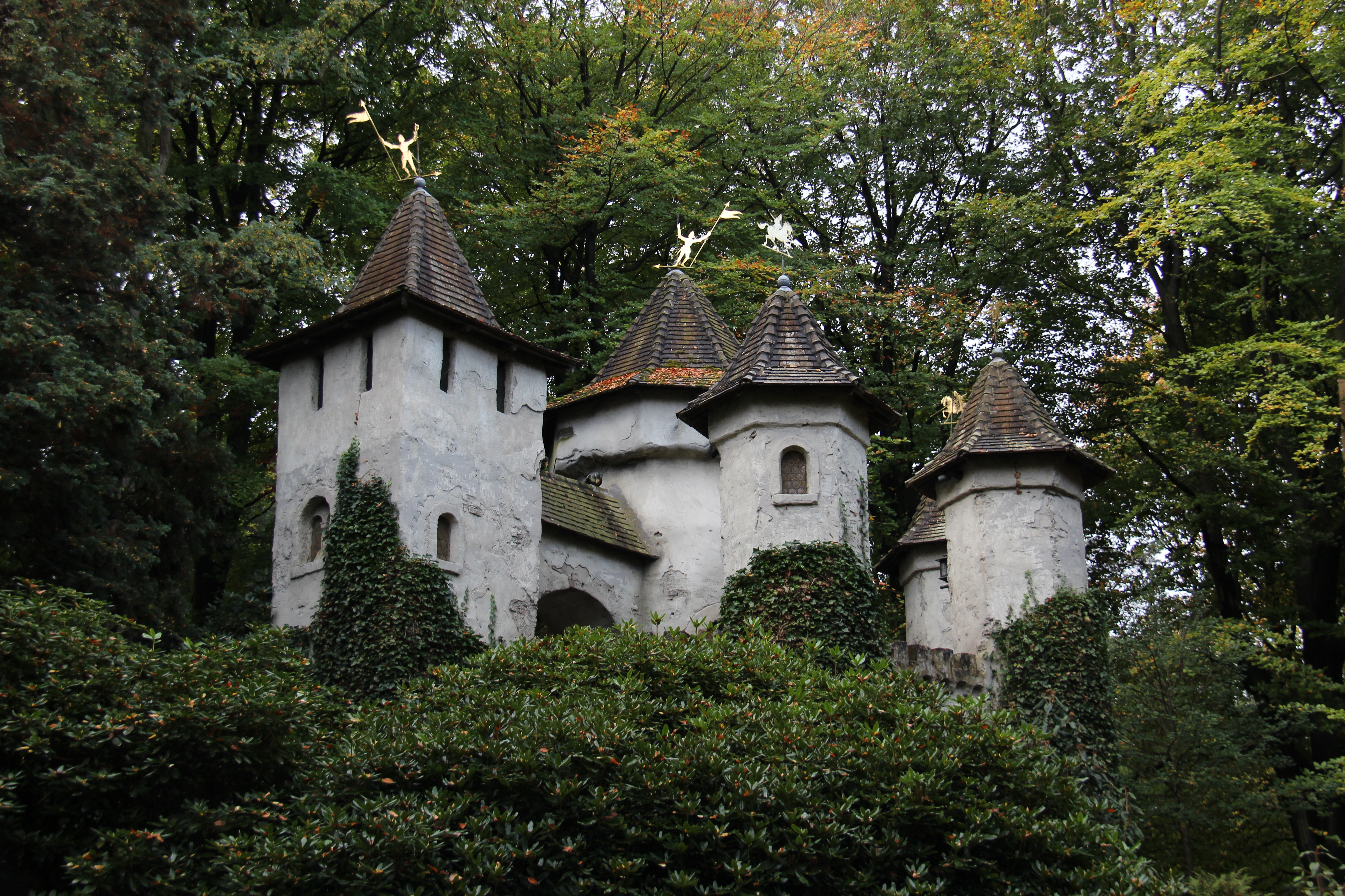 doornroosjes kasteel in de efteling